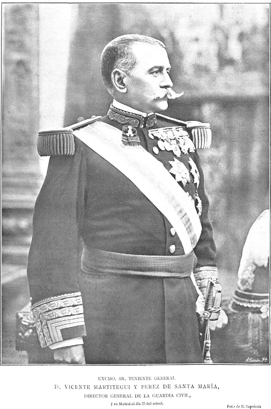 Retrato de Vicente Martitegui, fotografía de Emilio Fernández Tiffon (E. Napoleón), recogido en la revista española La Ilustración Española y Americana.